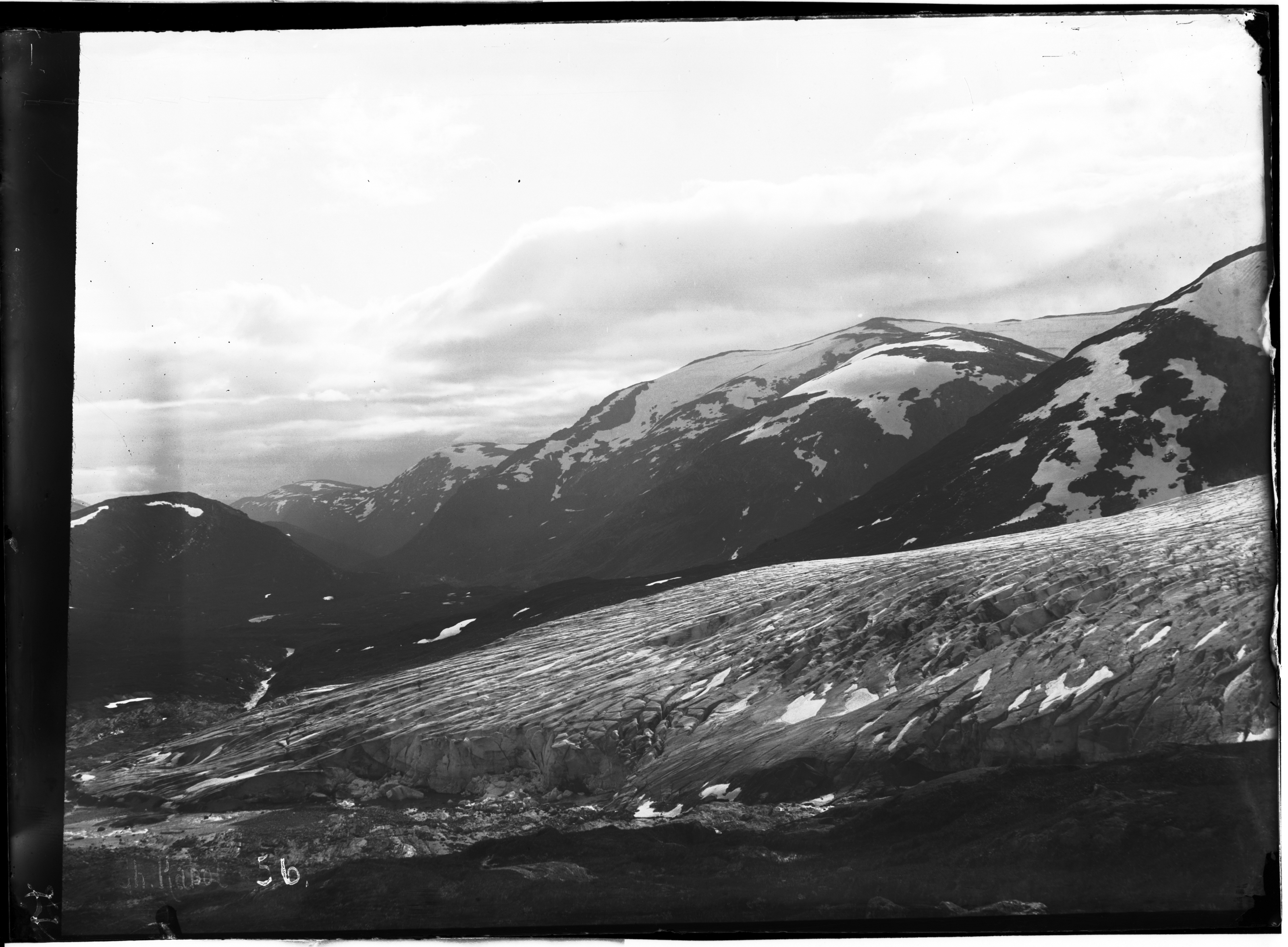 Image Note: Glacier, Svartisen, Norway Bildenotat: Den første isbre i Blakkådalen når man går ned fra Bogvatnet Date/Dato: 1882 Photographer/Fotograf: Charles Rabot Feel free to use the photos, but please make sure you attribute the photographer and mention NVE as the source. Bruk gjerne bildene, men vennligst oppgi fotografens navn og angi NVE som kilde. Format: Negative/Negativ